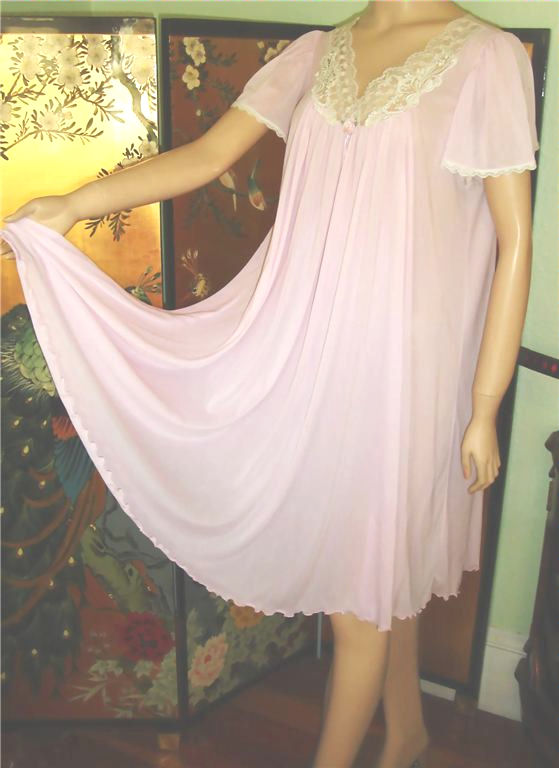 Pink nightie (yummy) :)